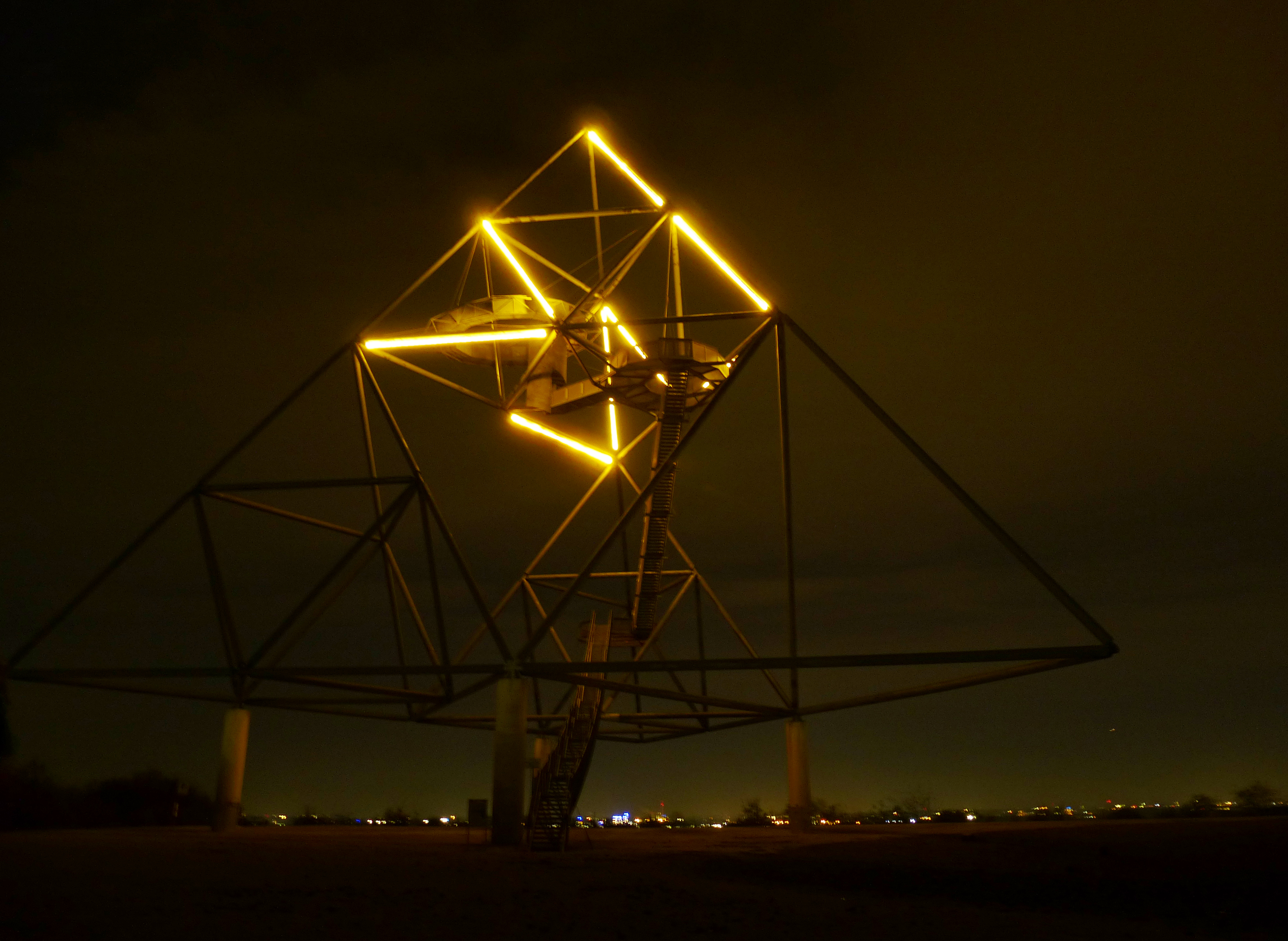 Das Nachtbild zeigt die Lichtinstallation "Fraktal" am Tetraeder